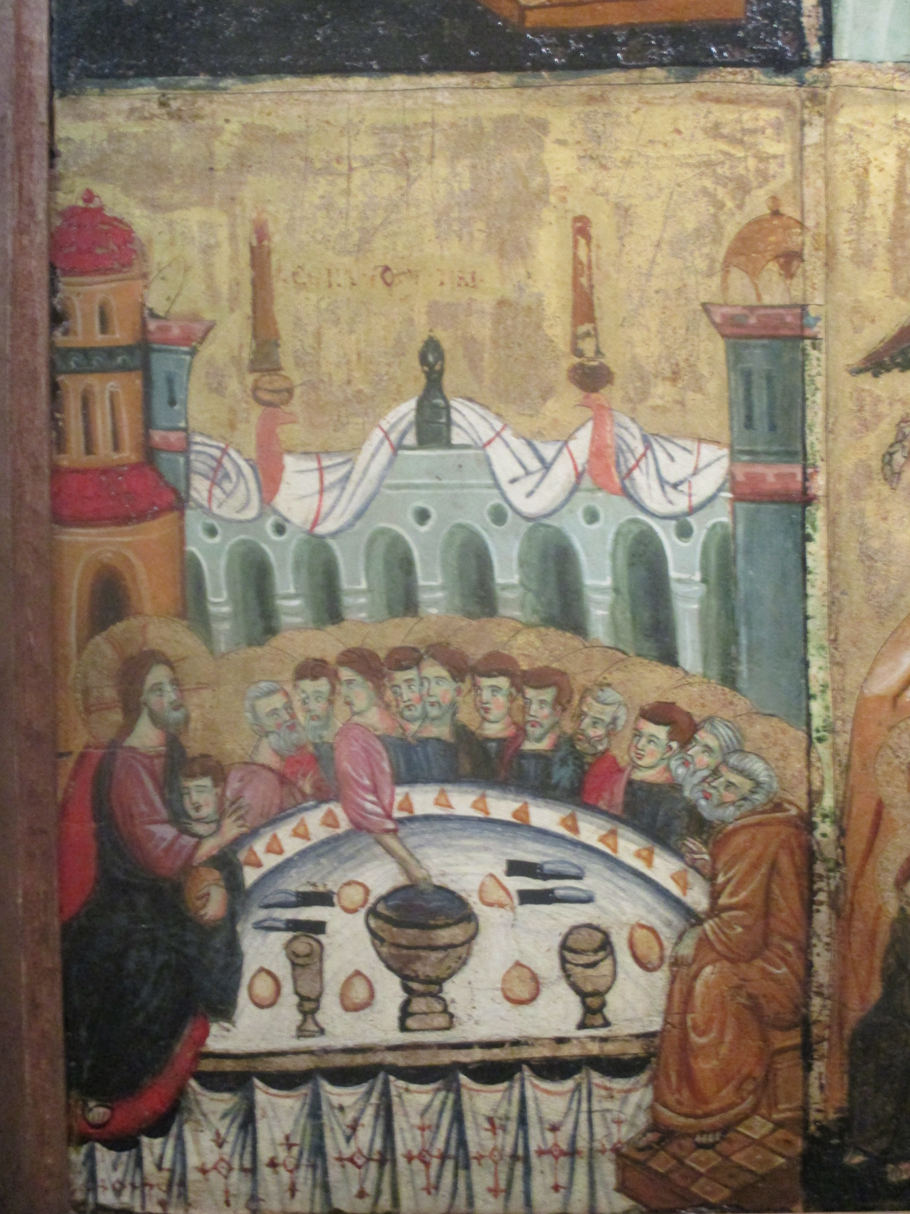 La Cène, une des huit scènes de la vie du Christ, tempera et or sur bois (3e quart du XIIIe siècle) par un peintre romain anonyme. Collection Alana, Newark présentée au musée Jacquemart-André de Paris du 13 septembre 2019 au 20 janvier 2020.